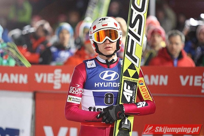 Konkurs drużynowy mężczyzn na skoczni K-120